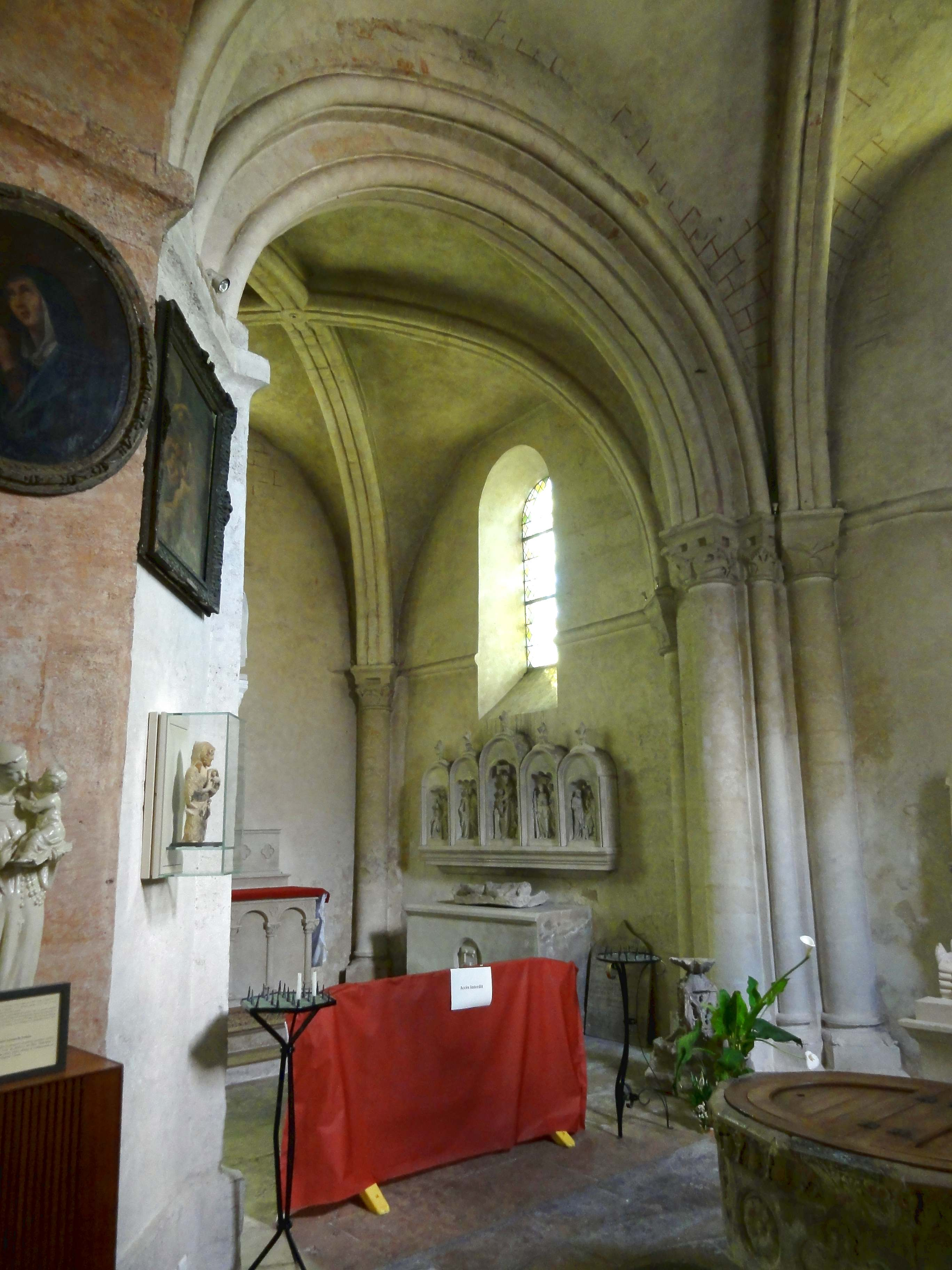 Intérieur de l'église - voir titre.